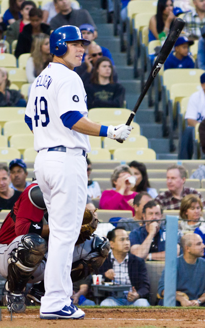 Trent Oeltjen